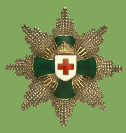 Magyar Vöröskereszt Érdemcsillaga